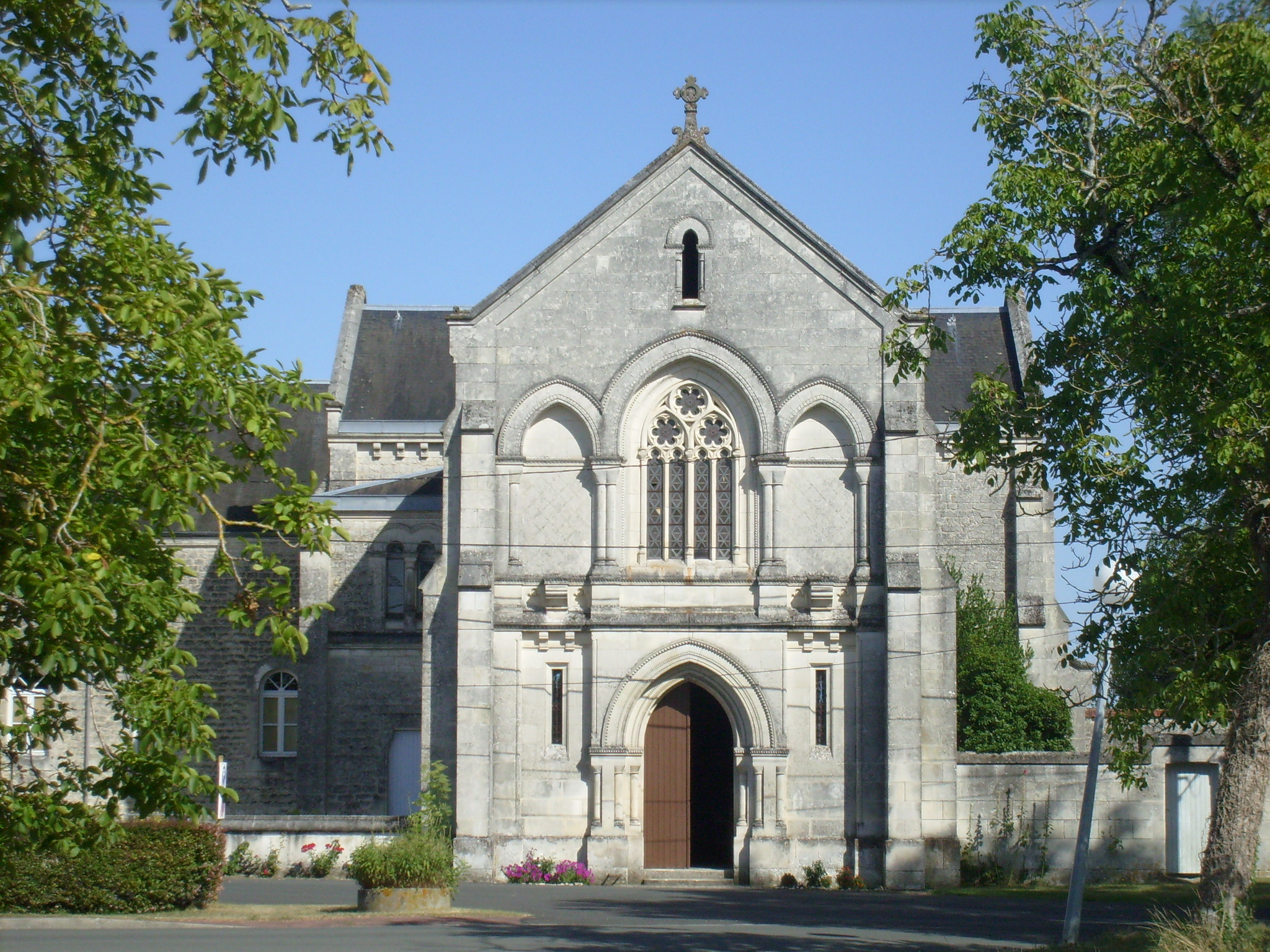 Façade de l'église Notre-Dame-de-Recouvrance à Saintes